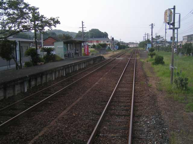 久原駅 投稿者が撮影(2006/08/28)